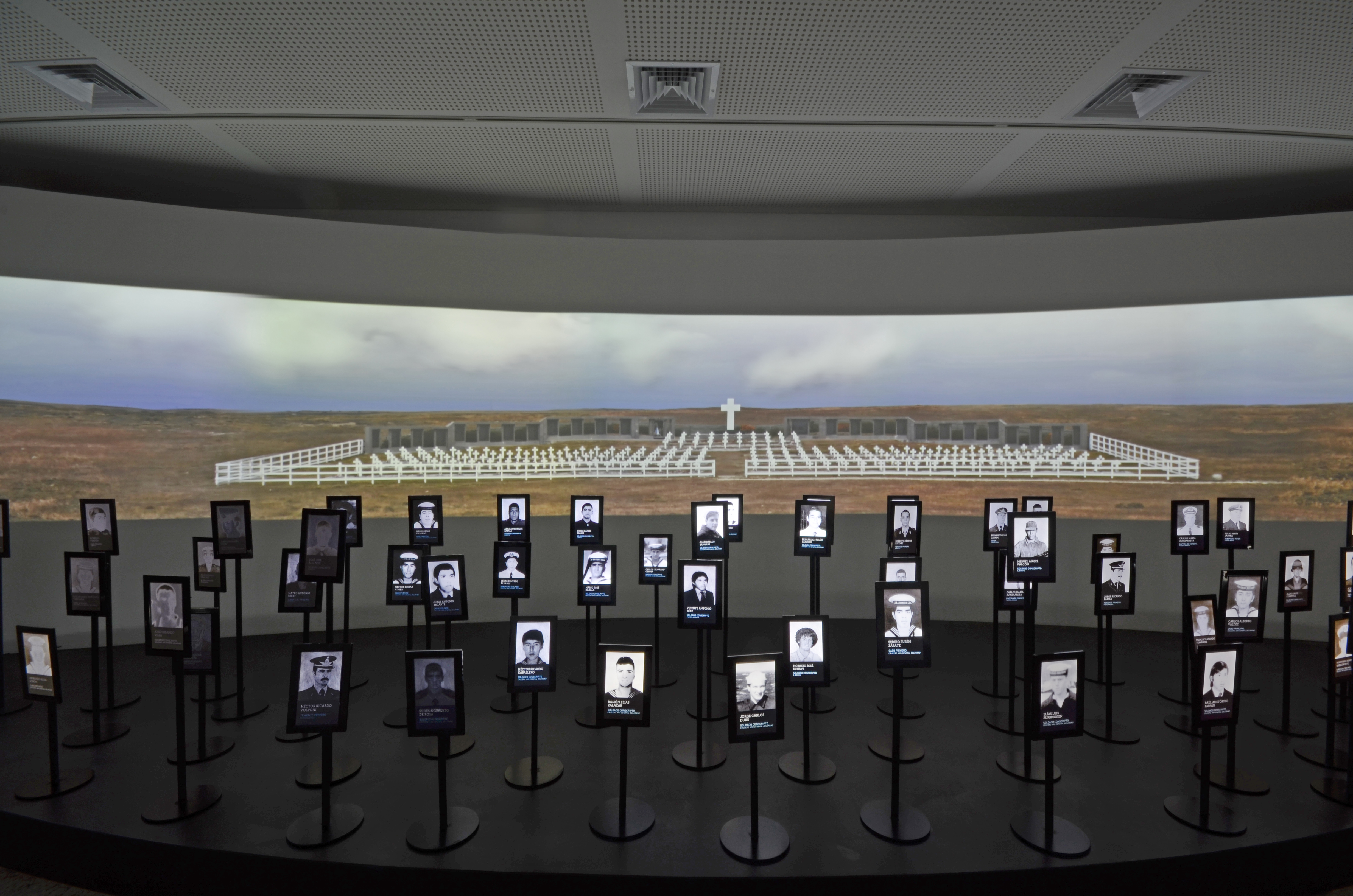 10 de diciembre de 2014.- Museo Malvinas e Islas del Atlántico Sur